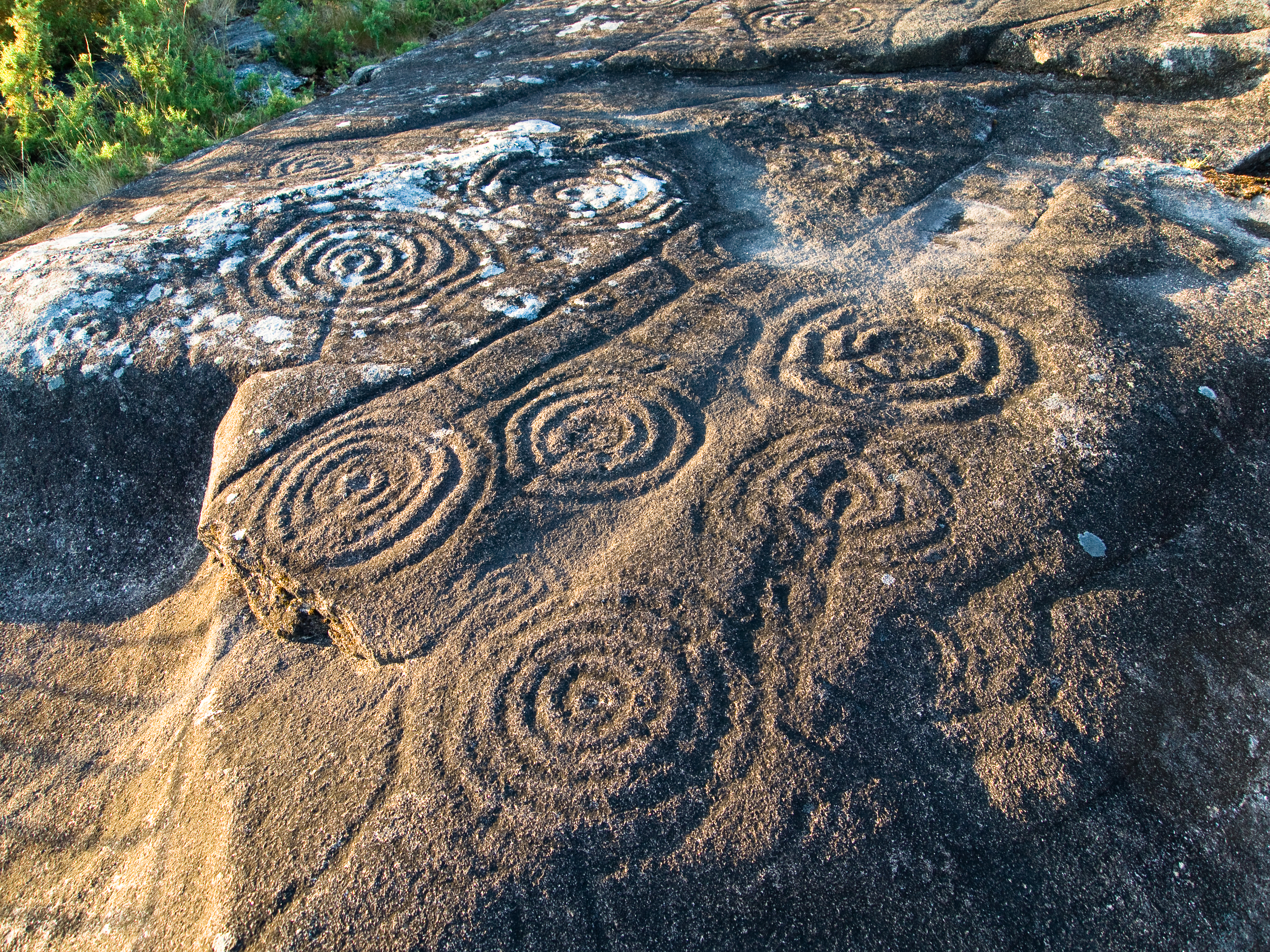 Laxe das Rodas - Grupo XXIX do Outeiro do Lombo da Costa - San Xurxo de Sacos - Cotobade - Pontevedra - Galicia